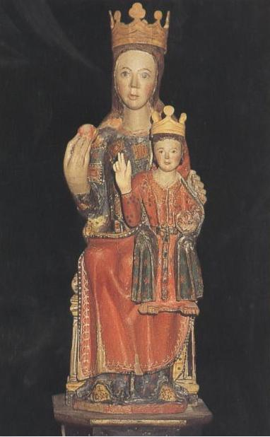 Imagen Virgen del Miron